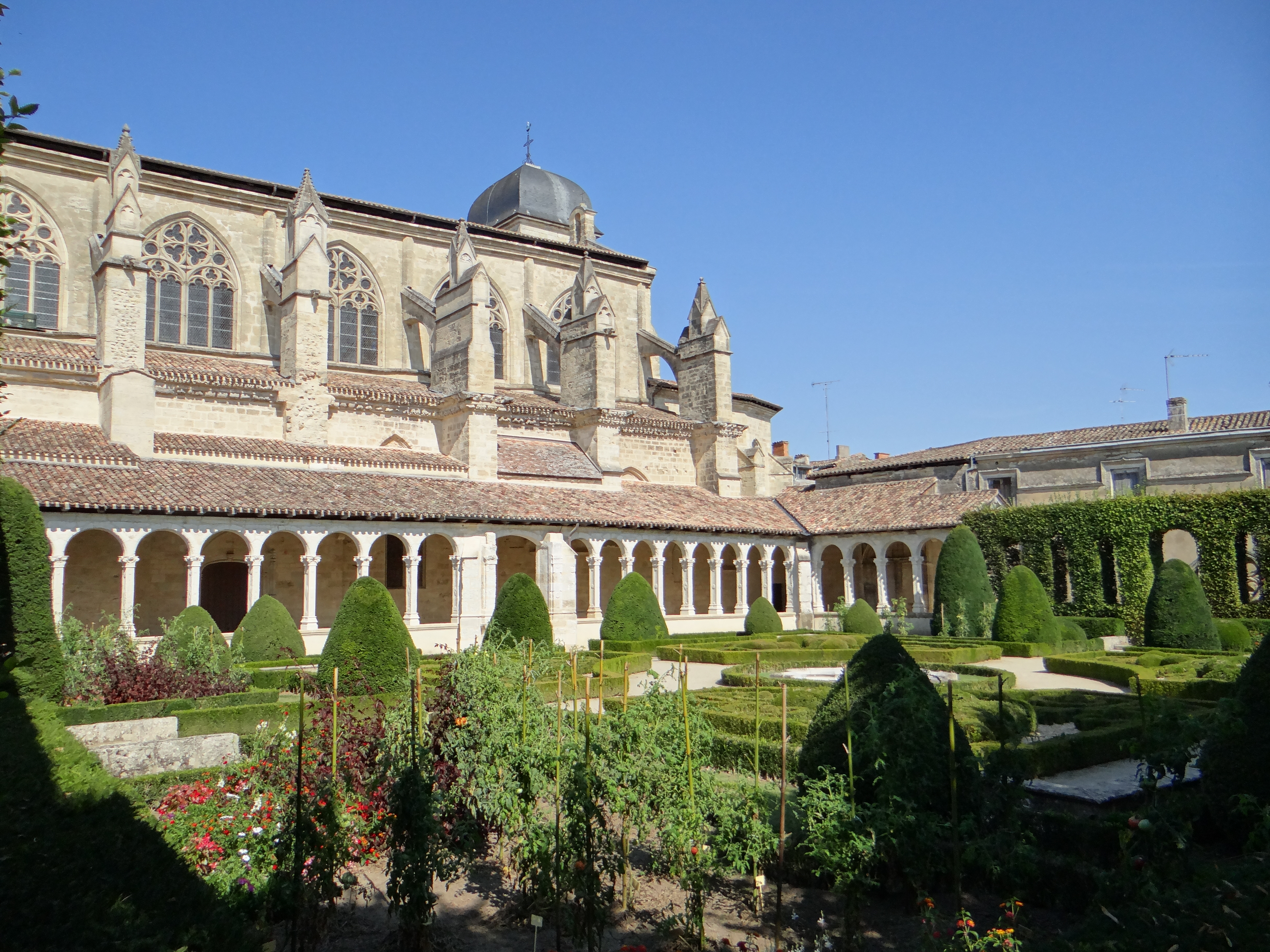 Marmande - Jardin du cloître de l'église Notre-Dame de Garonne